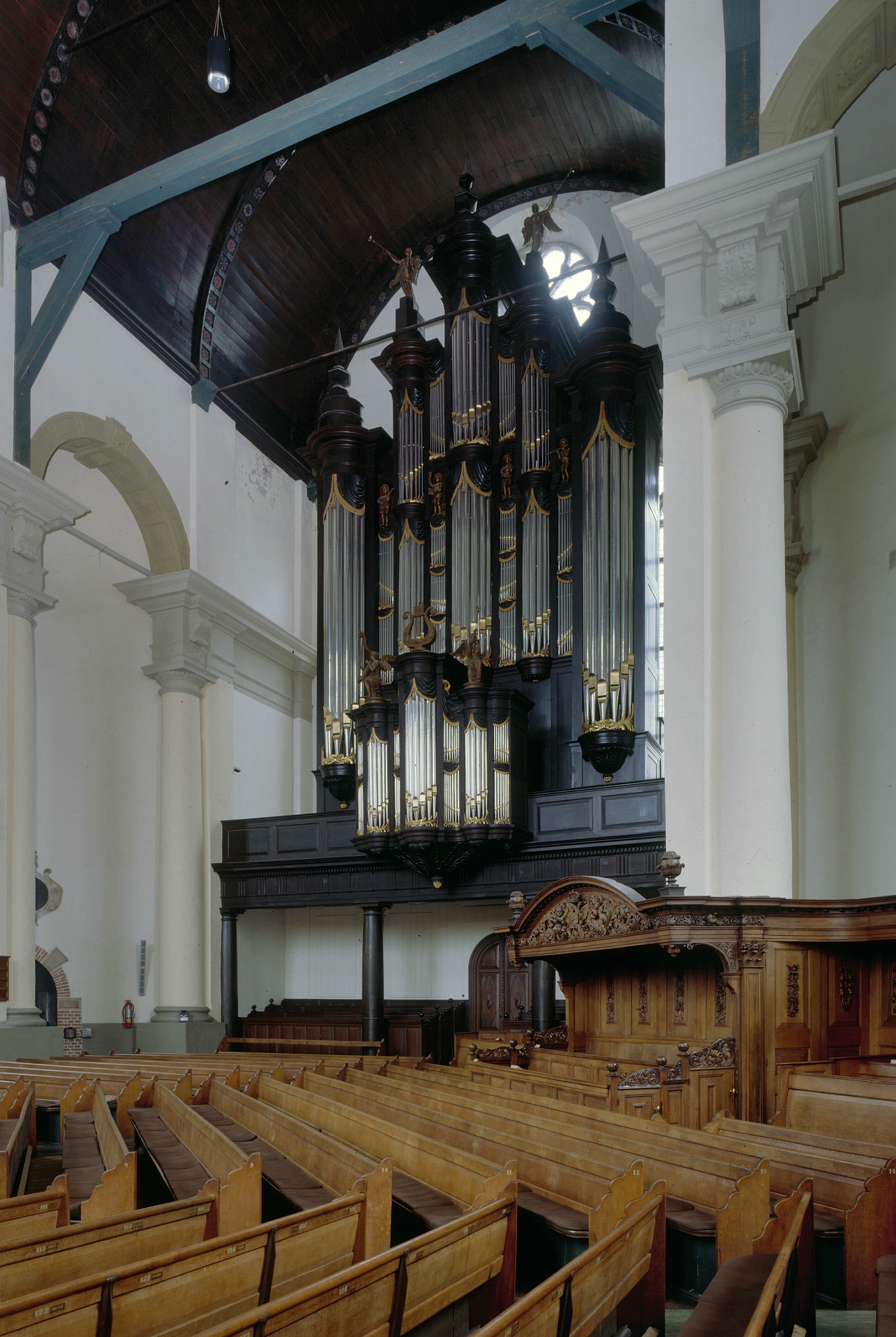 Nieuwe kerk: Interieur, aanzicht orgel, orgelnummer 556 (opmerking: Gefotografeerd voor Het Historische Orgel in Nederland 1819-1840, bladzijde 263)